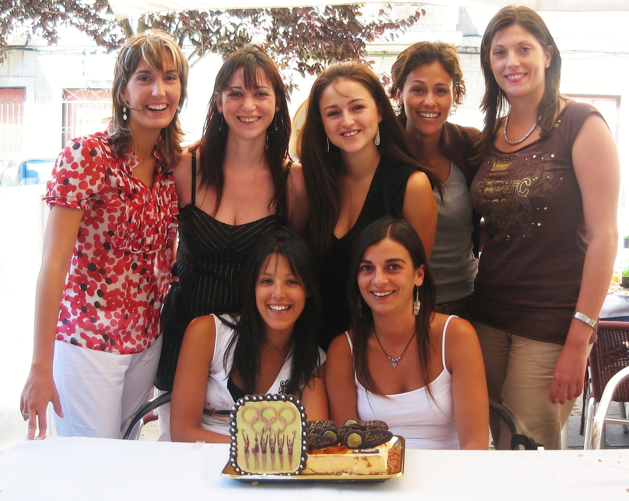 Imagen promocional del documental Las Niñas de Oro con las integrantes del conjunto español de gimnasia rítmica de 1996, en su reencuentro el 12 de agosto de 2006 en Ávila para el rodaje de dicho documental con motivo del décimo aniversario de la medalla de oro olímpica en Atlanta. De pie, de izquierda a derecha: Maider Esparza, Estíbaliz Martínez, Nuria Cabanillas, Estela Giménez y Lorena Guréndez. Sentadas: Tania Lamarca y Marta Baldó.